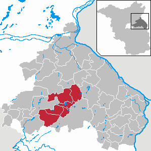 Amt Märkische Schweiz in Brandenburg (Country) - District Märkisch-Oderland